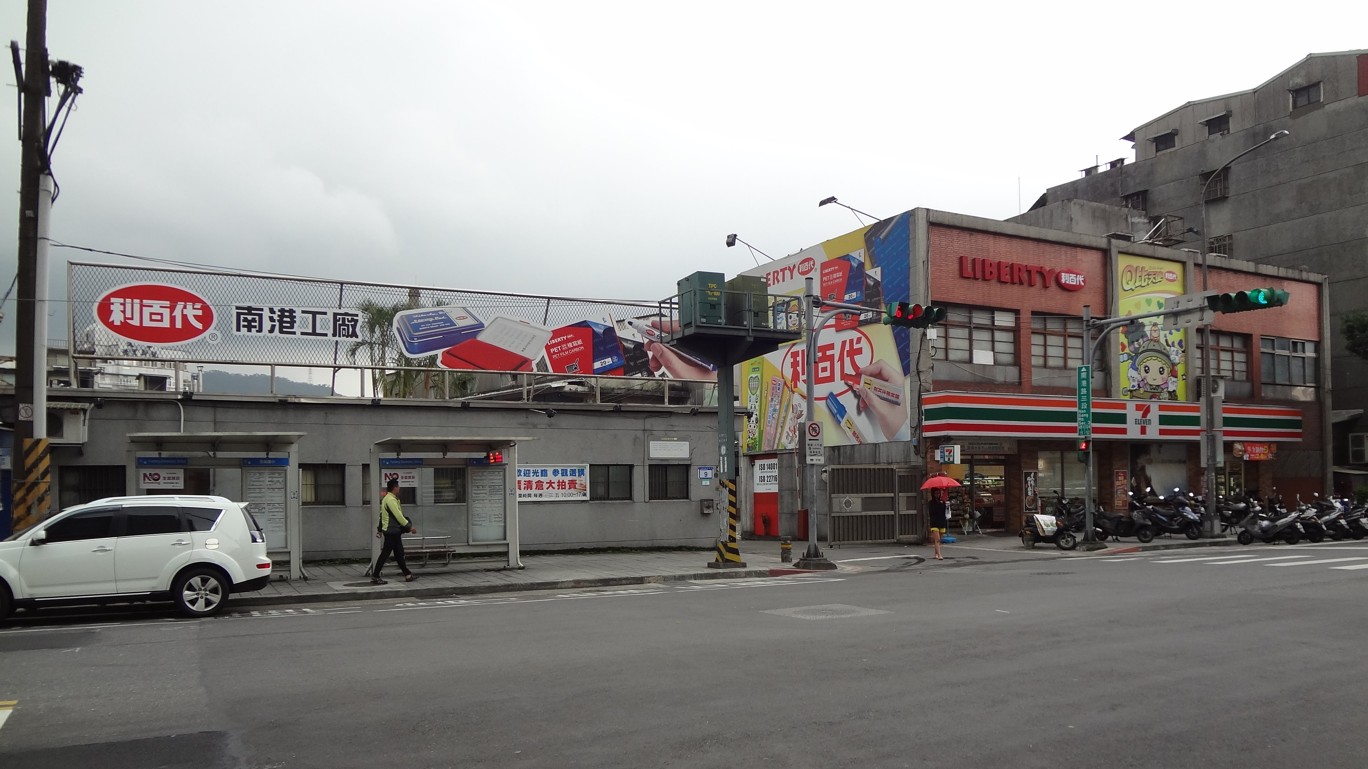 利百代國際南港廠，位於臺北市南港區南港路三段9號。大門右方建築物1樓是統一超商玉成門市。